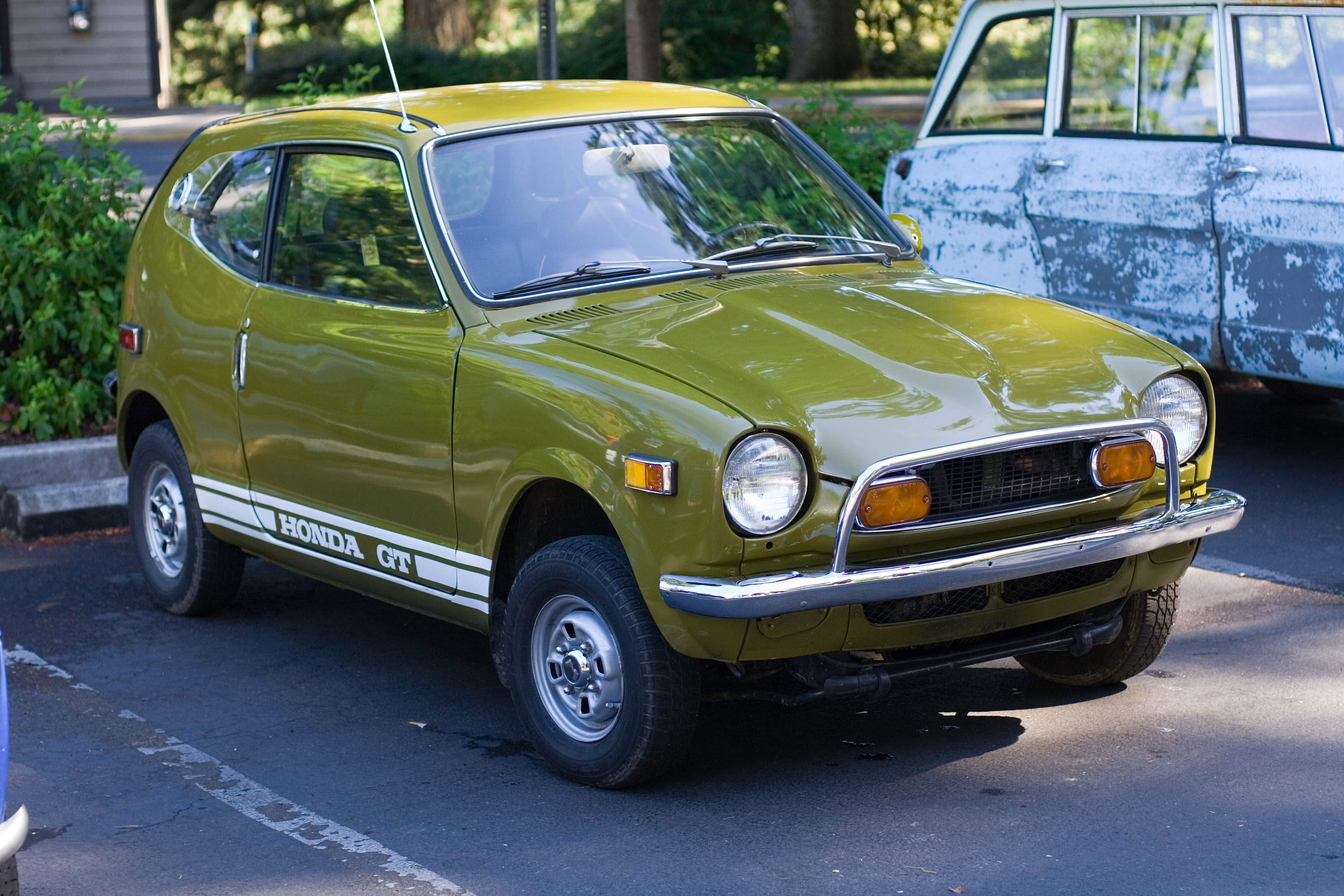 Honda 600.